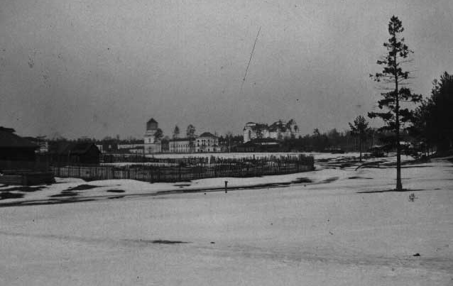 Руины Выксунского Иверского монастыря